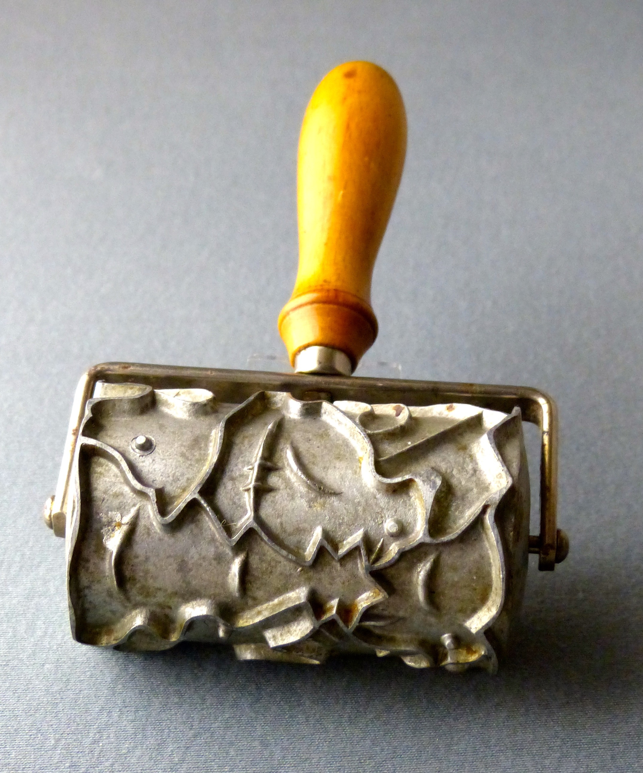 Erzgebirgsmuseum Annaberg: Spekulatiusrolle (um 1900)